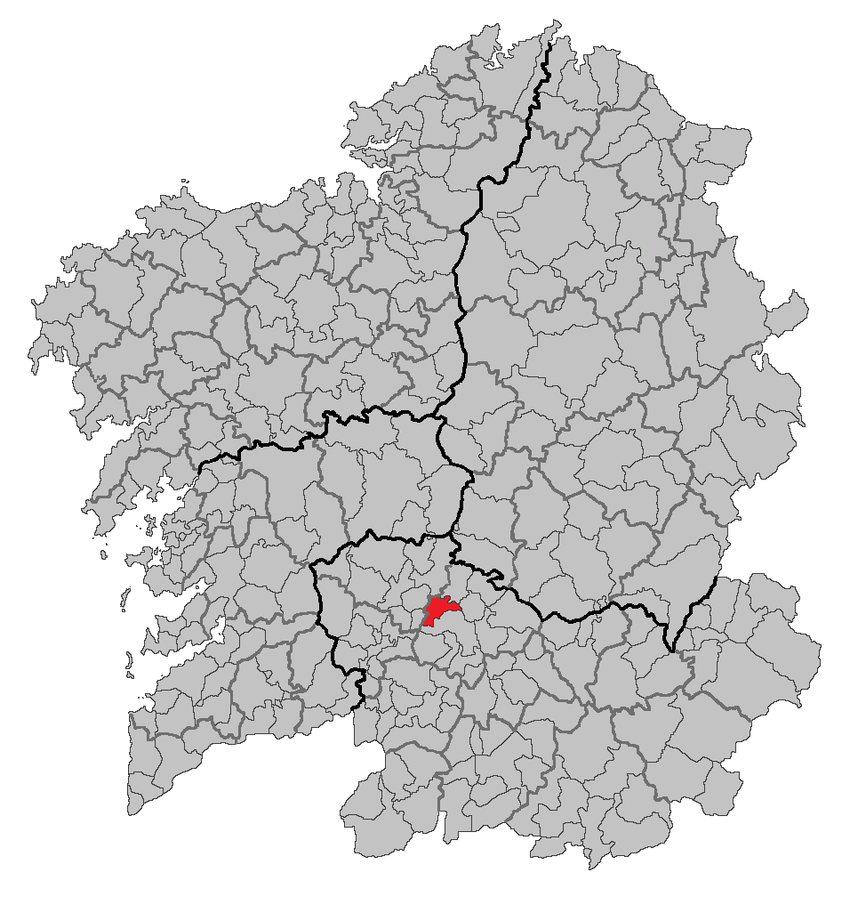 Mapa coa localización do concello de Amoeiro.